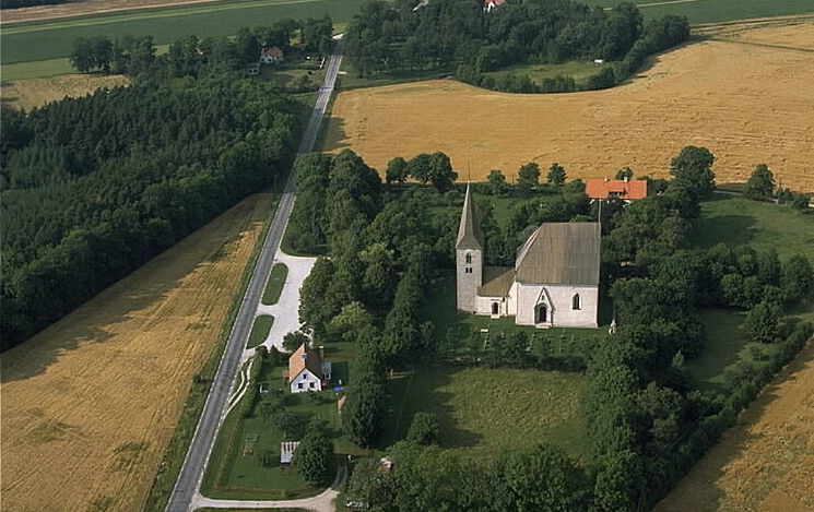 Motiv: Källunge kyrka Nyckelord: Flygbilder, Riksintressen Kategori: KyrkomiljöKällunge kyrka